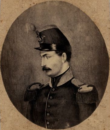 Agesilao Milano, ritratto del 1855 ca, immagine ritagliata, dal sito